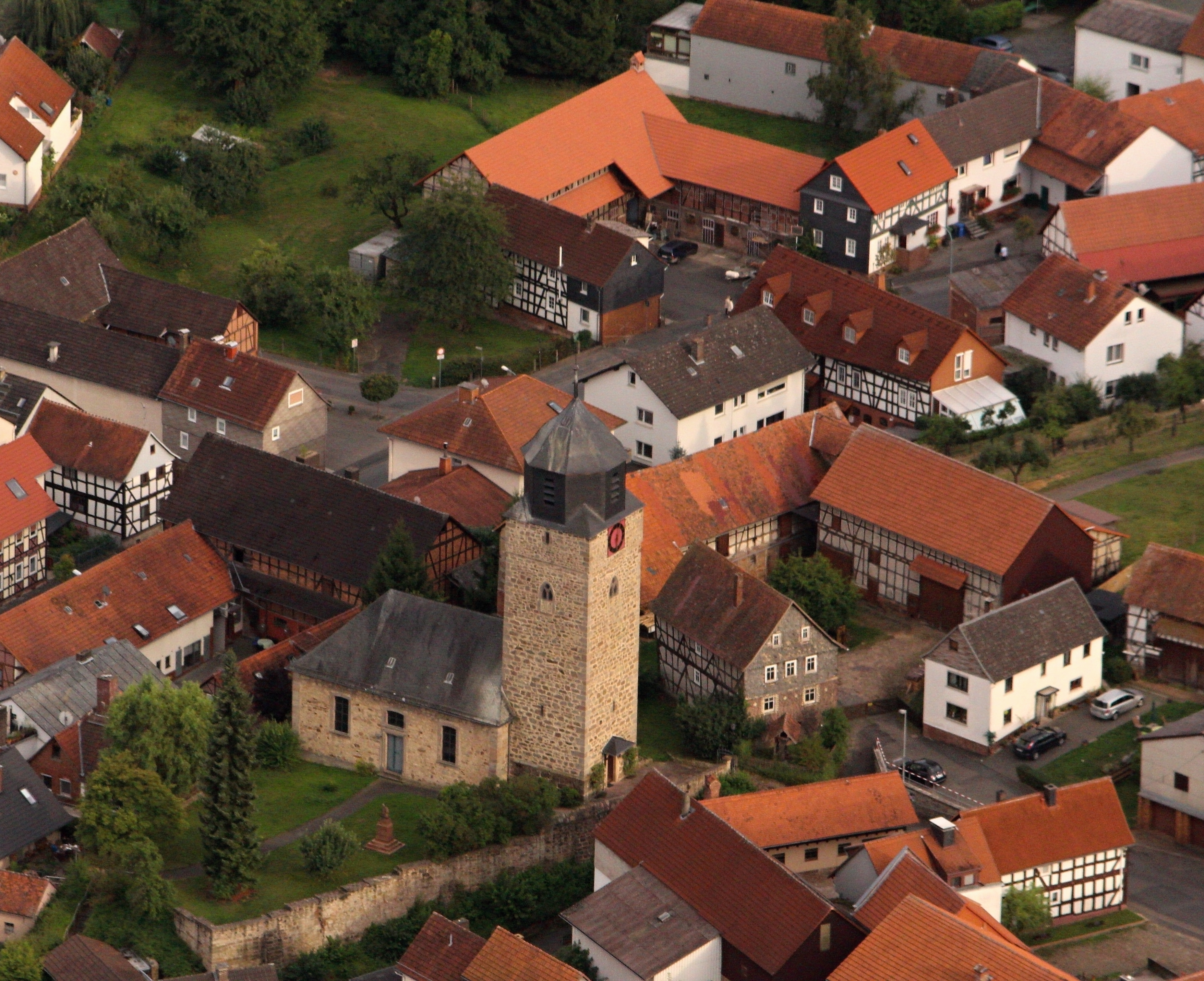 Die Martinskirche wurde in der heutigen Form in den Jahren 1769 bis 1774 erbaut. Der Wehrturm wurde bereits Mitte des 13. Jh. n.Chr. errichtet.